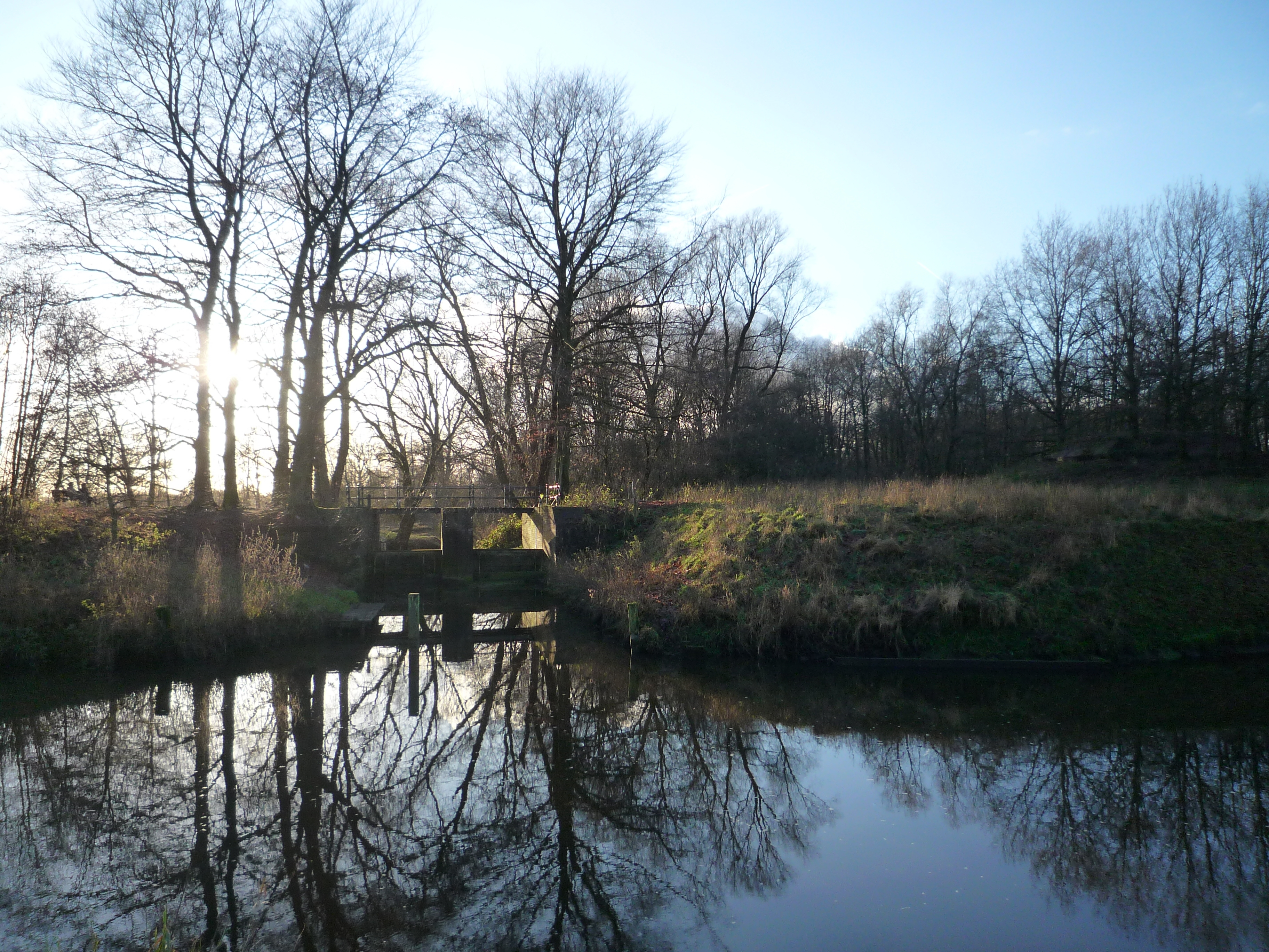 Valleikanaal bij Leusden, Bruinenburgersluis